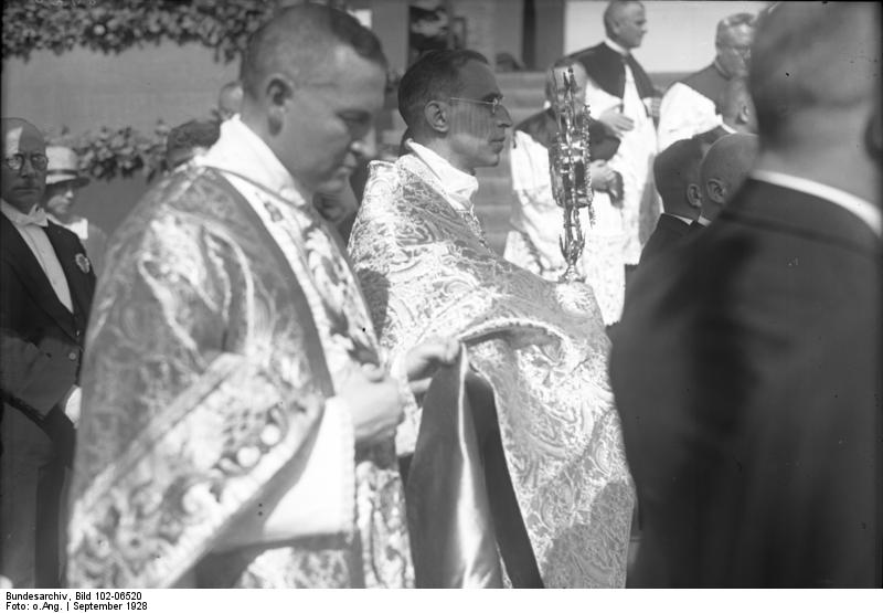 Der große Katholikentag in Magdeburg! Der päpstliche Nuntius Kardinal Pacelli im Prozessionszuge.